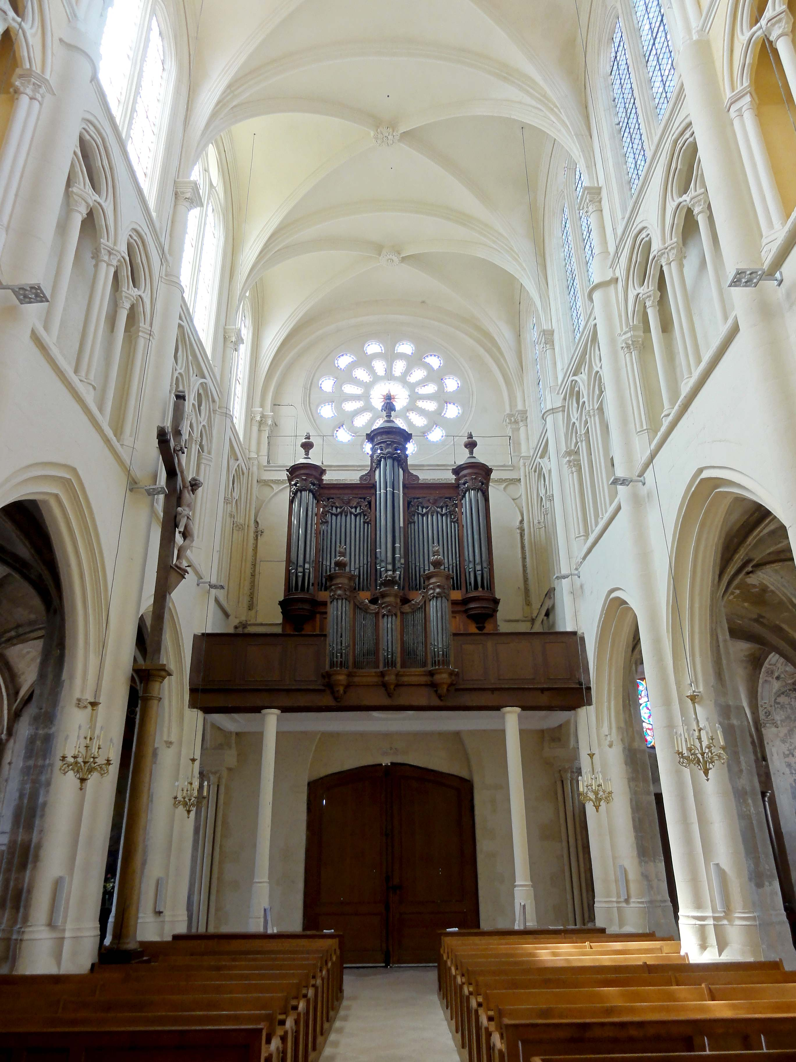 Voir titre.